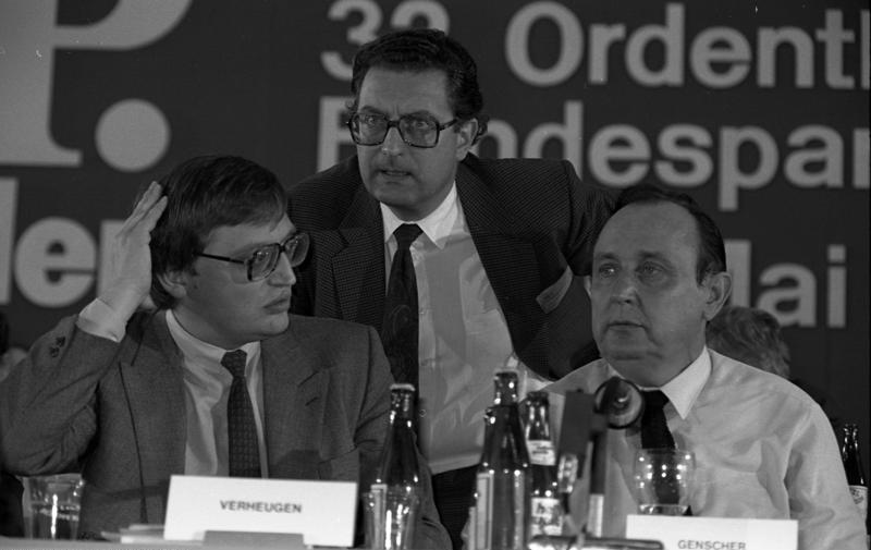 32. Ordentlicher Parteitag der FDP in der Halle 8 des Kölner Messegeländes.